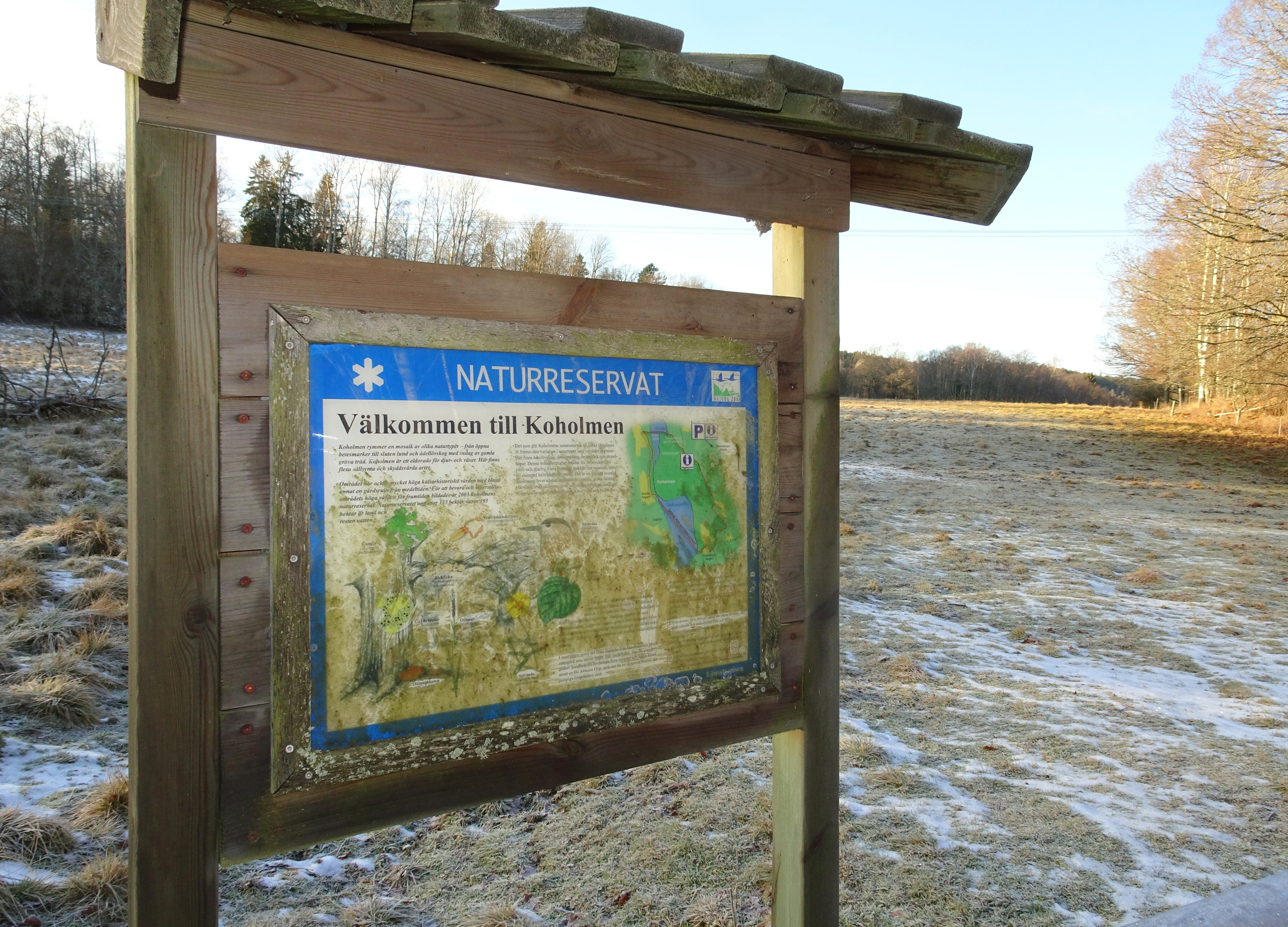 Koholmens naturreservat, Nyköpings kommun